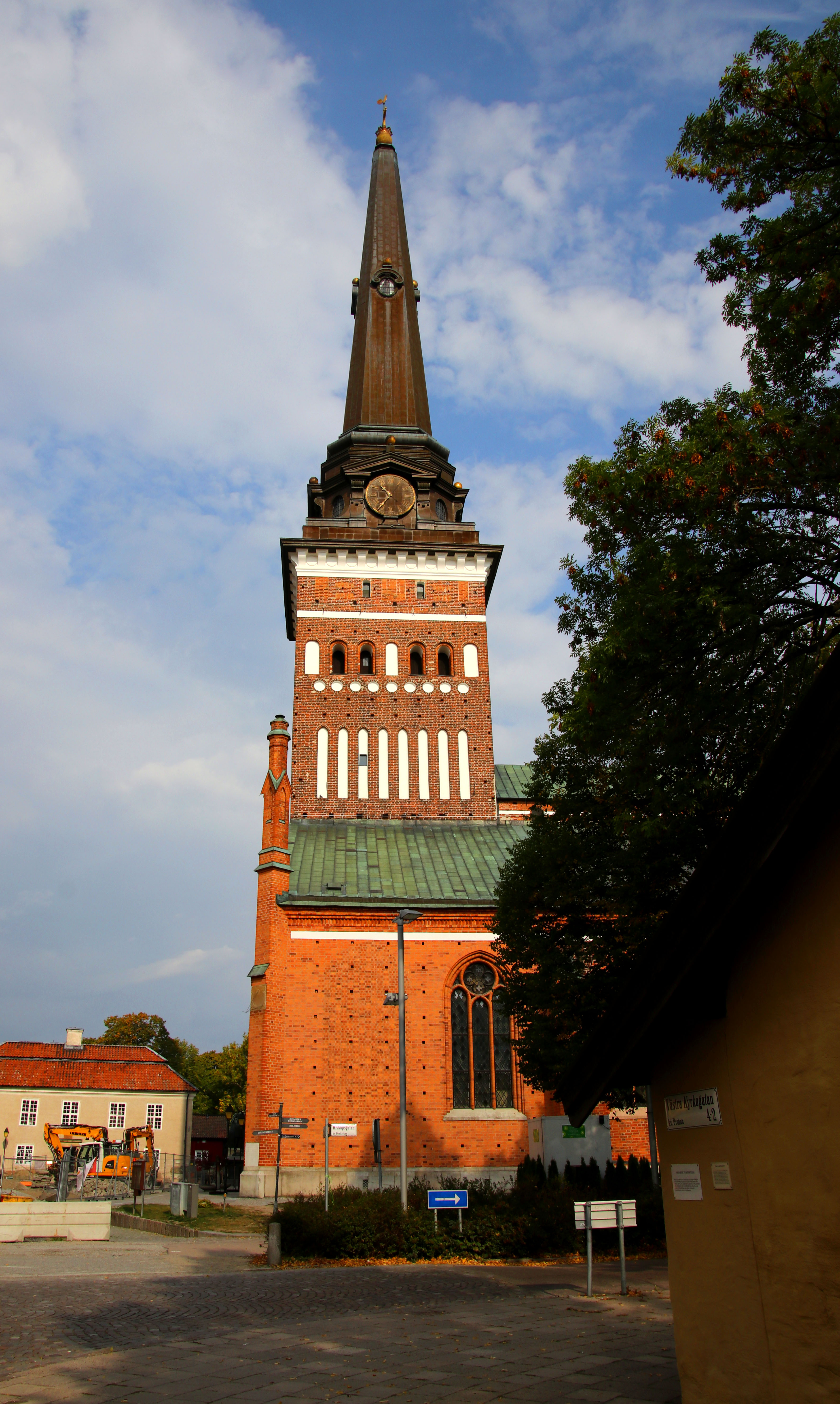 Västerås. Domkyrkan.